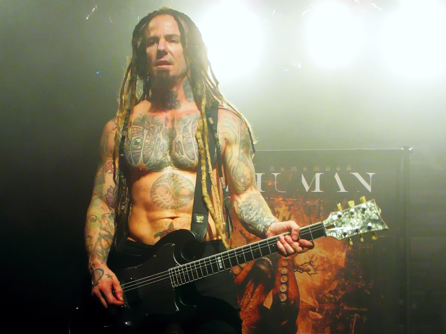 Logan Mader live bei einem Konzert mit seiner Band Once Human im Colos-Saal, Aschaffenburg